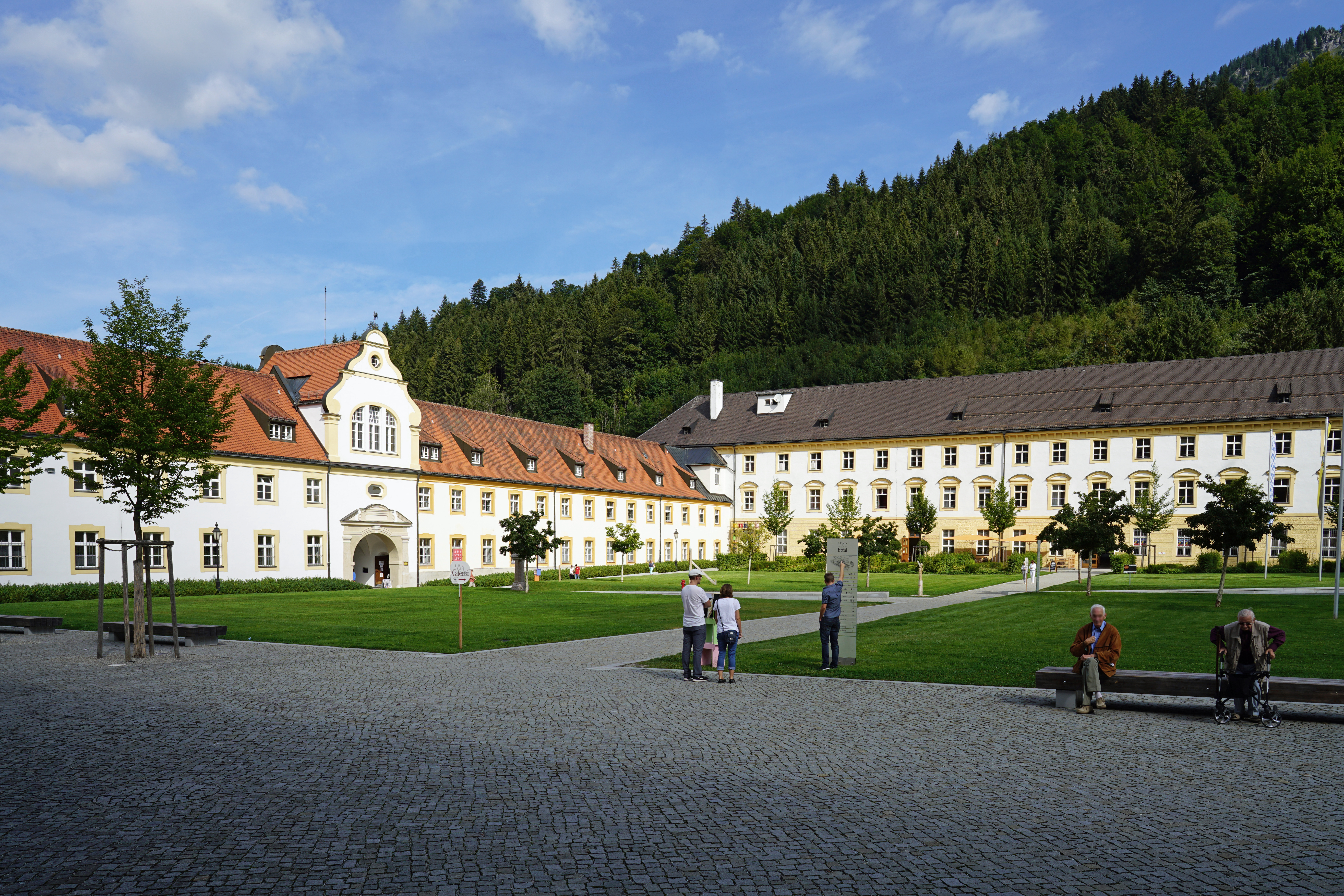 Innenhof Kloster Ettal